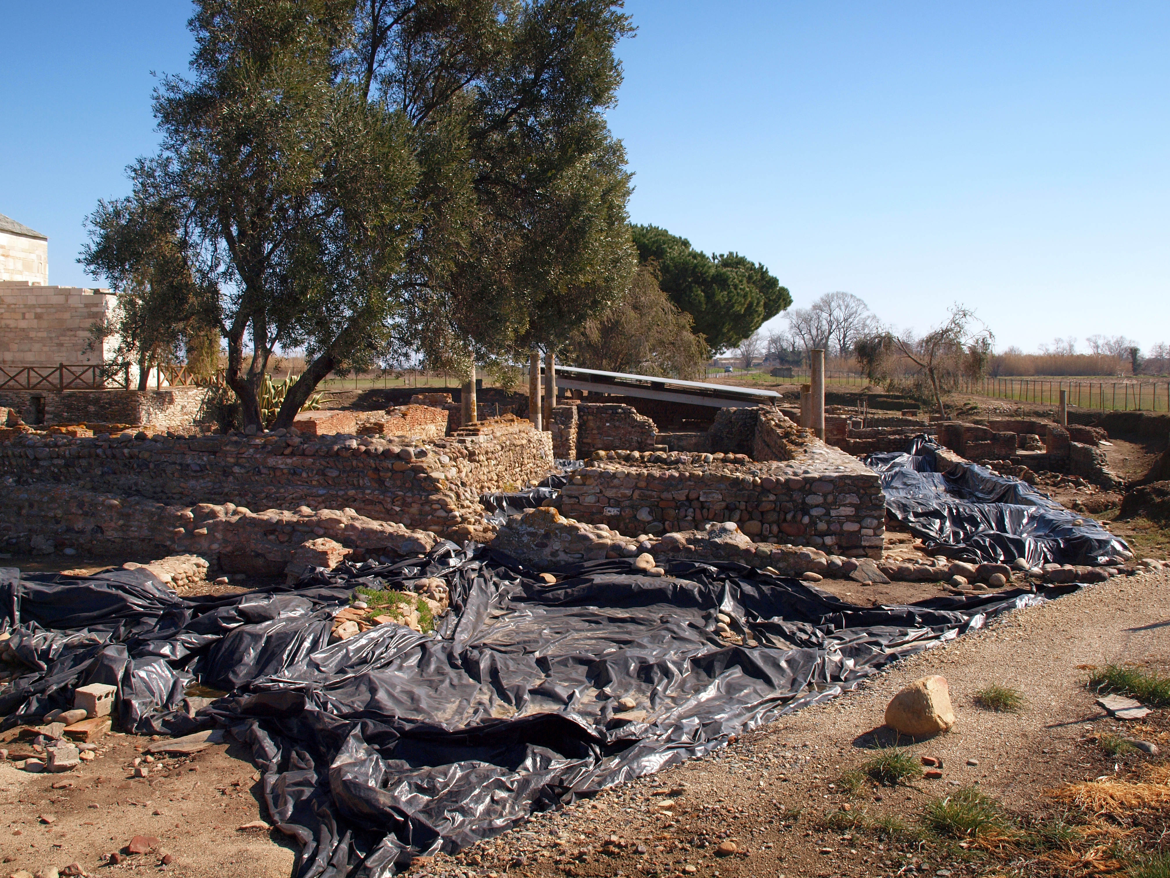 Lucciana, La Marana (Haute-Corse) - Site archéologique de Mariana à la Canonica